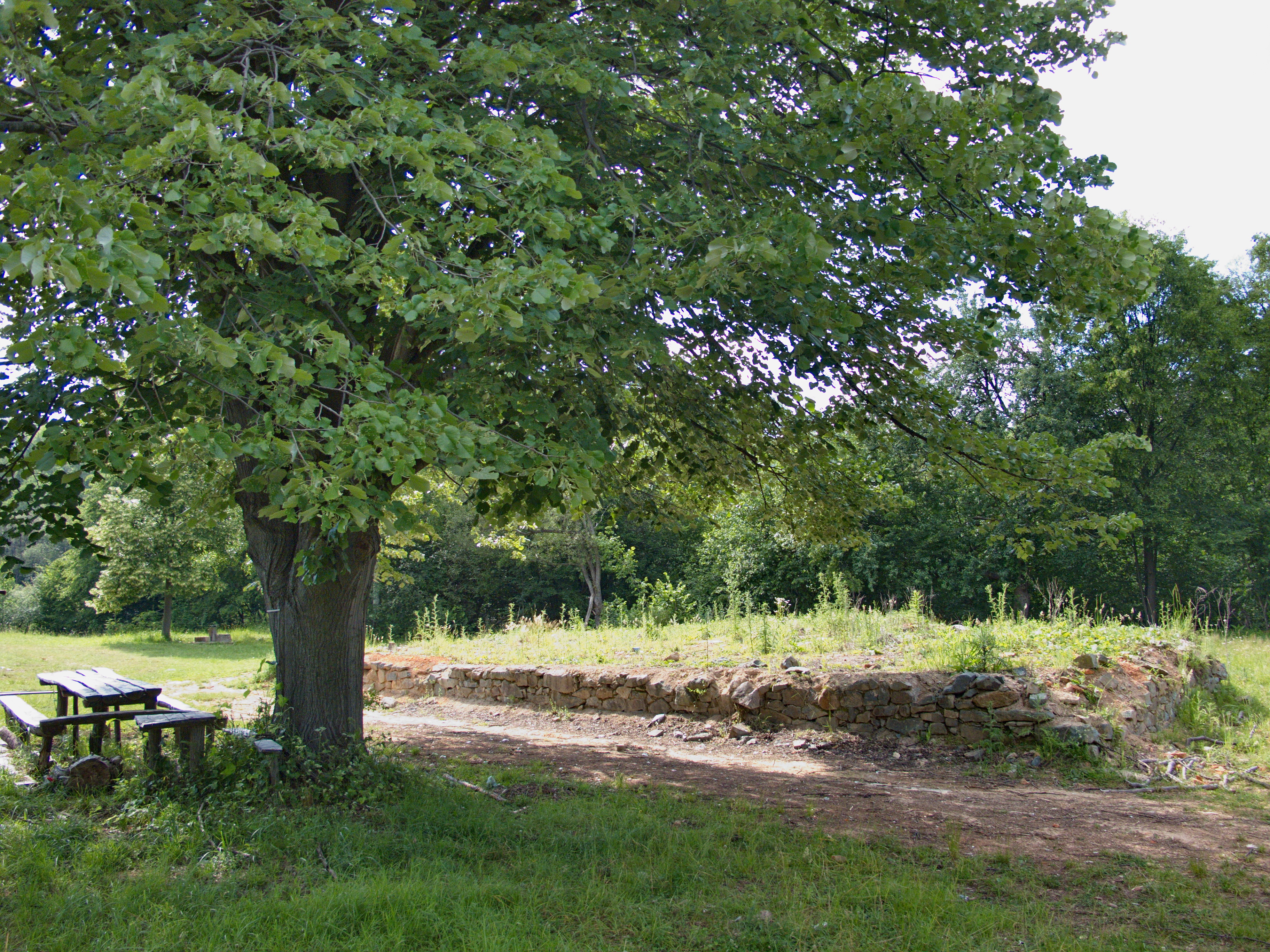 Центар некадашњег, а сада напуштеног, села Липа. Остали су само темељи некадашње школе